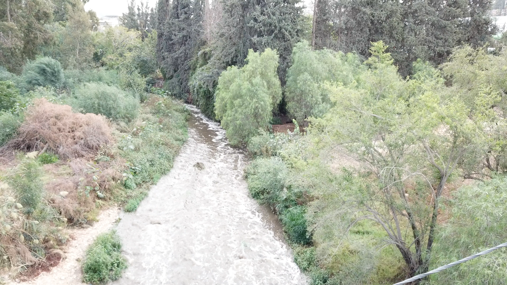 נחל שורק סמוך לבית שמש קרדיט צילום: "רווח הפקות" בית שמש